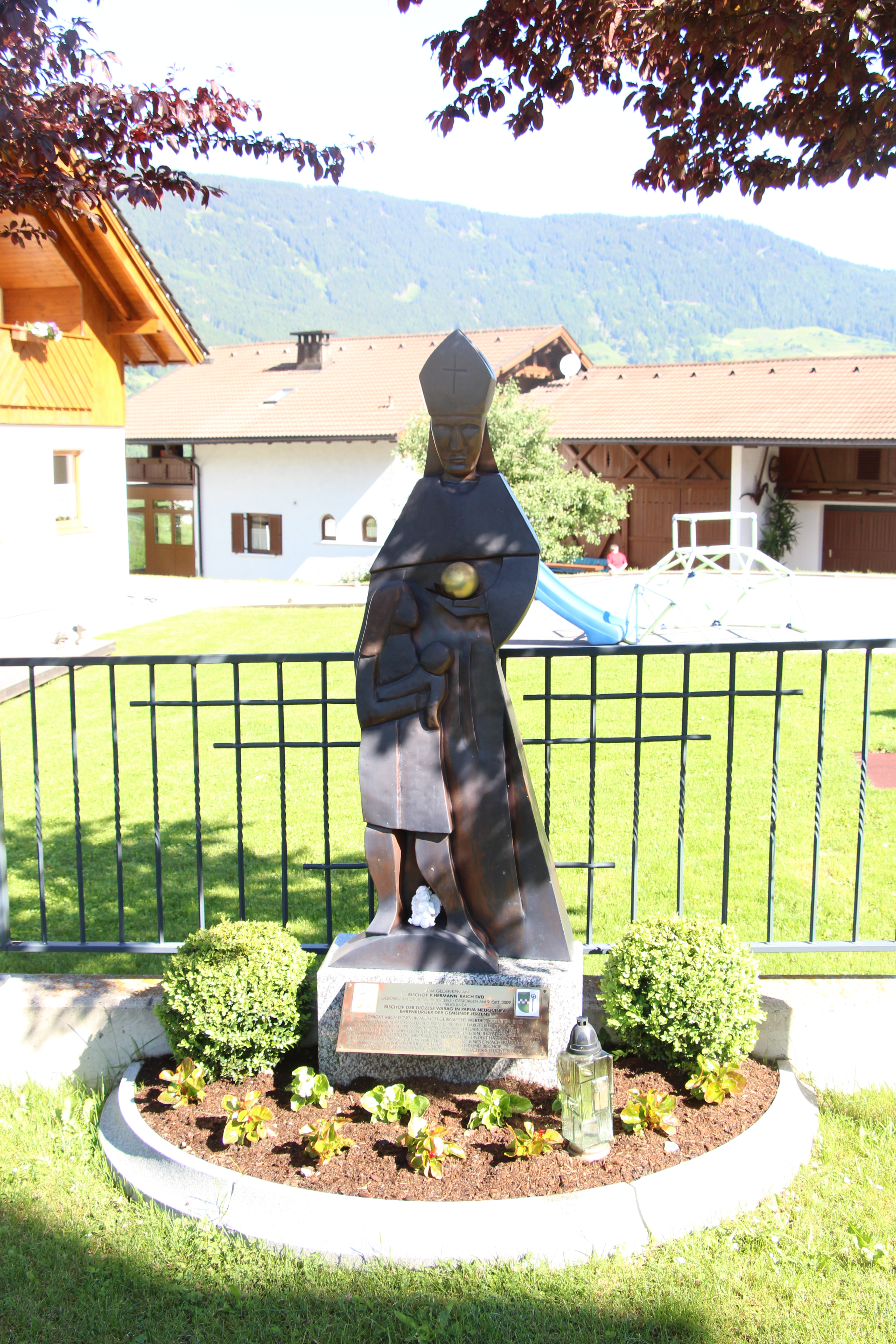 Grab von Bischof Hermann Raich, Jerzens